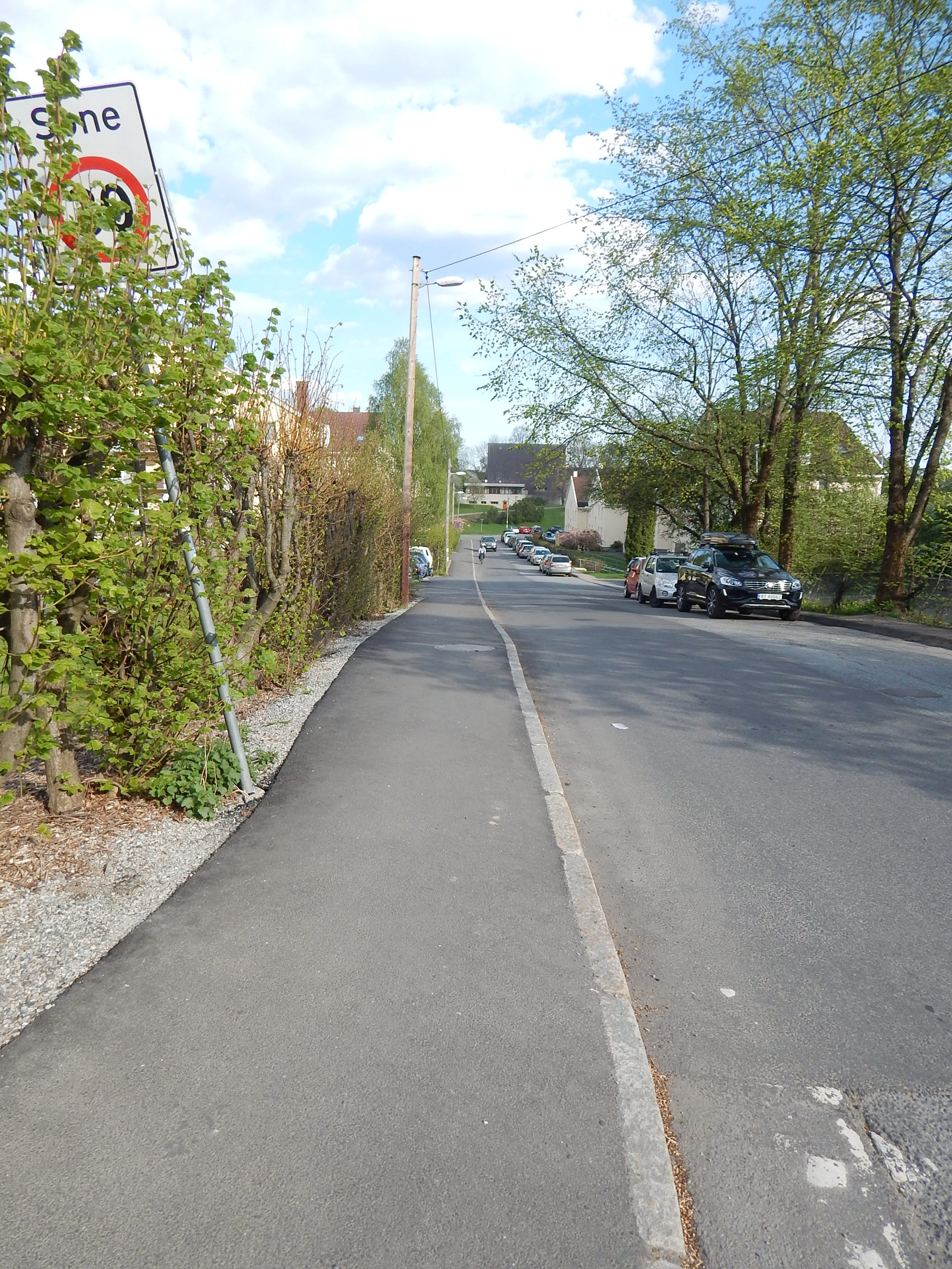 Christophers vei sett fra Tåsenveien